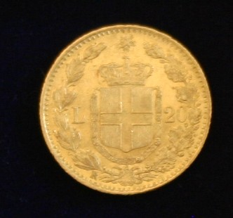 20 Lire Italien 1883